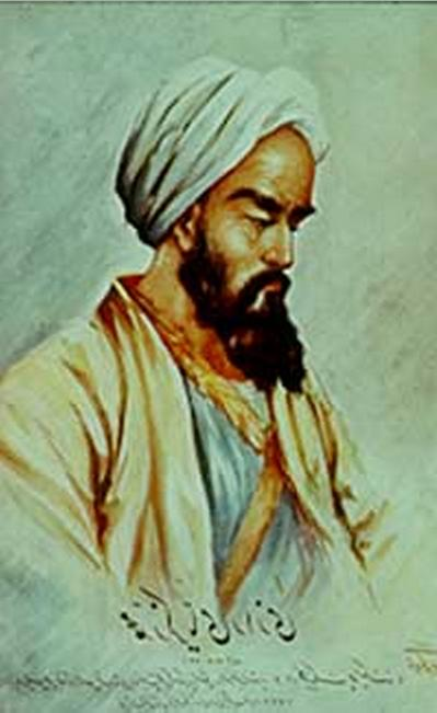 Faraj ben Salim in un ritratto d'epoca.Noto anche come Mosè Faragi di Girgenti , anche Faragiu o Ferrarius